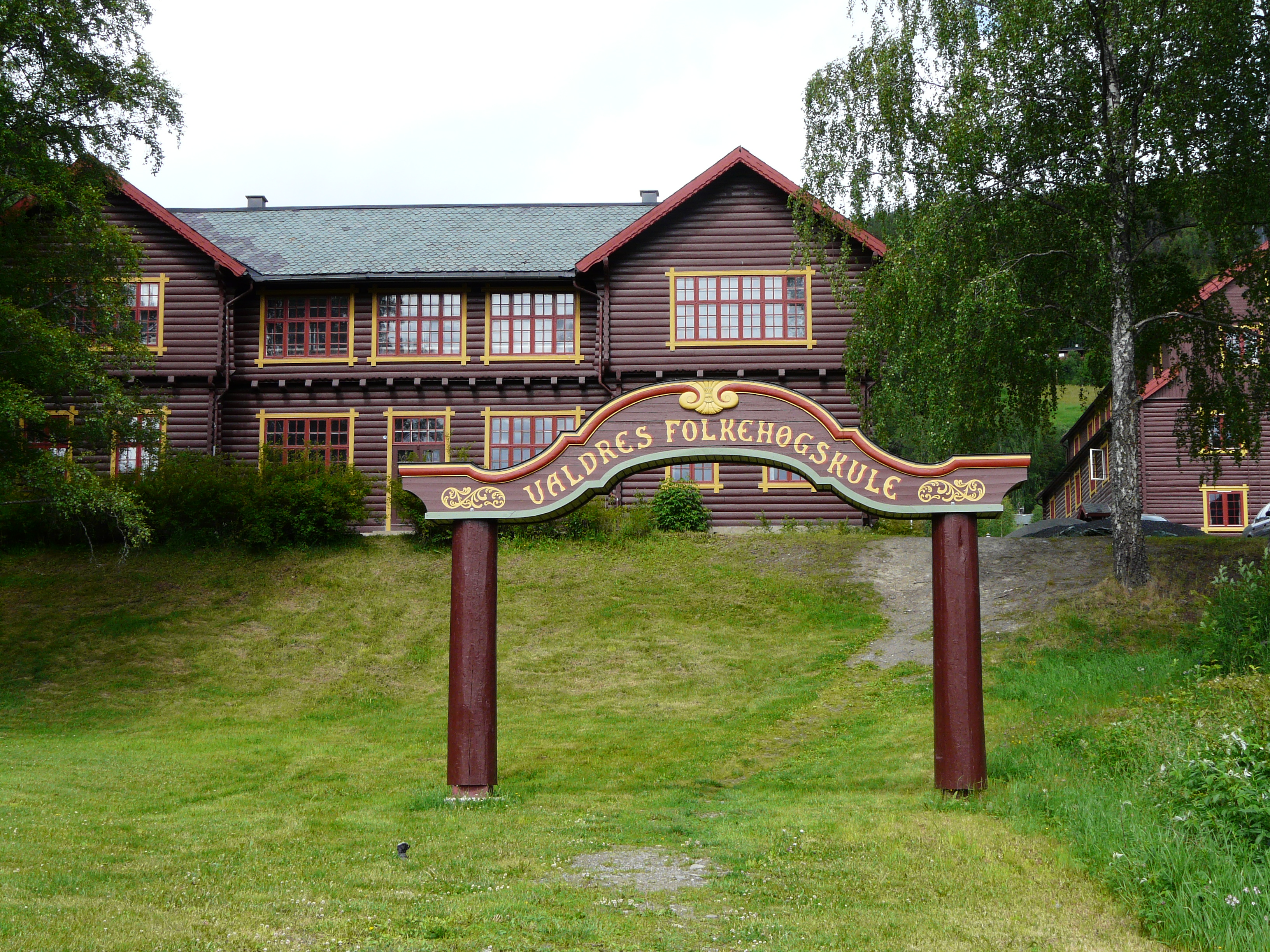 Inngangsporten til Valdres folkehøgskule på Leira i Oppland.